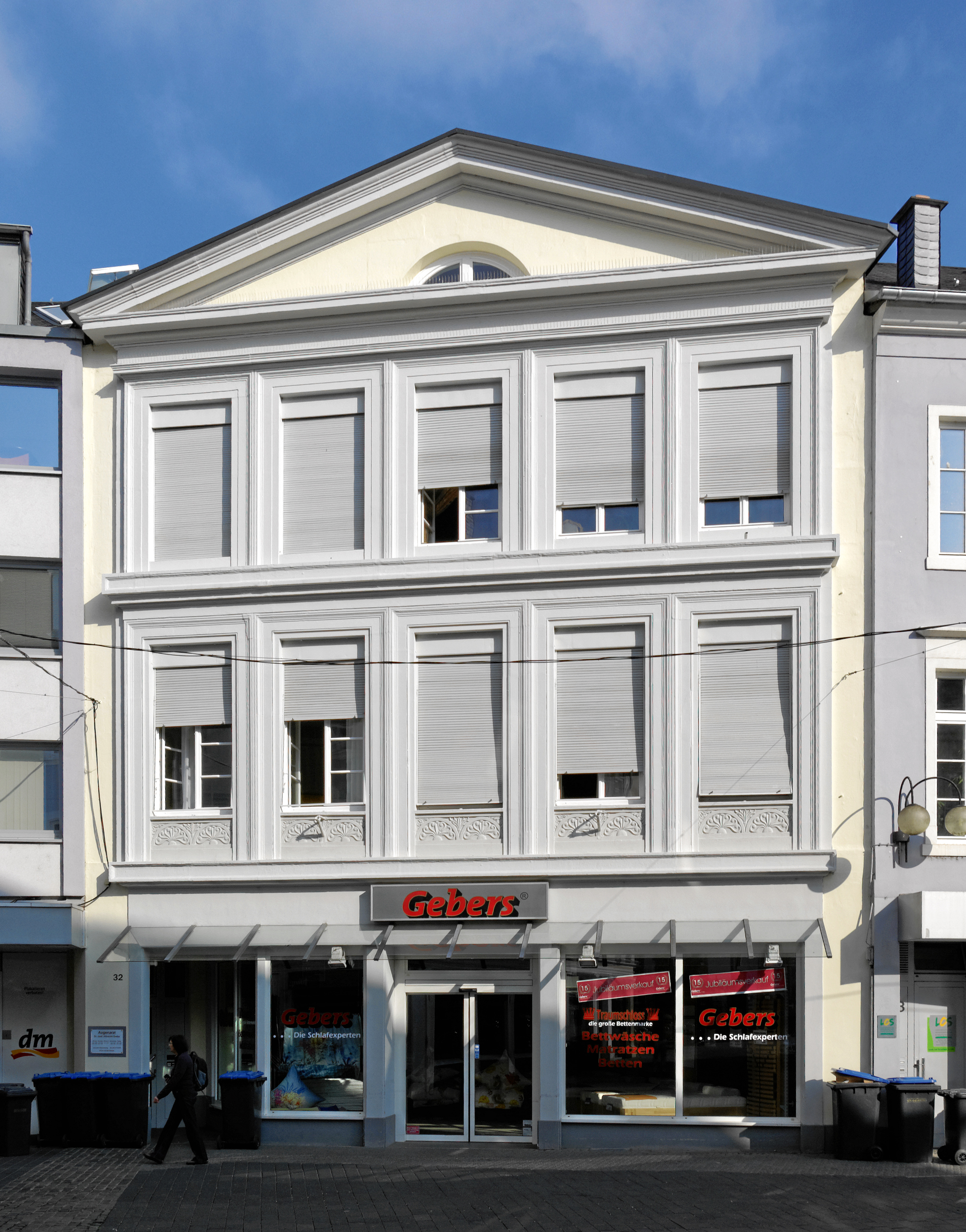 Trier, Brotstraße 32, klassizistische Fassade des 1832 errichteten, 1944 kriegszerstörten Wohnhauses über hochmittelalterlichem Keller; straßenbildprägend